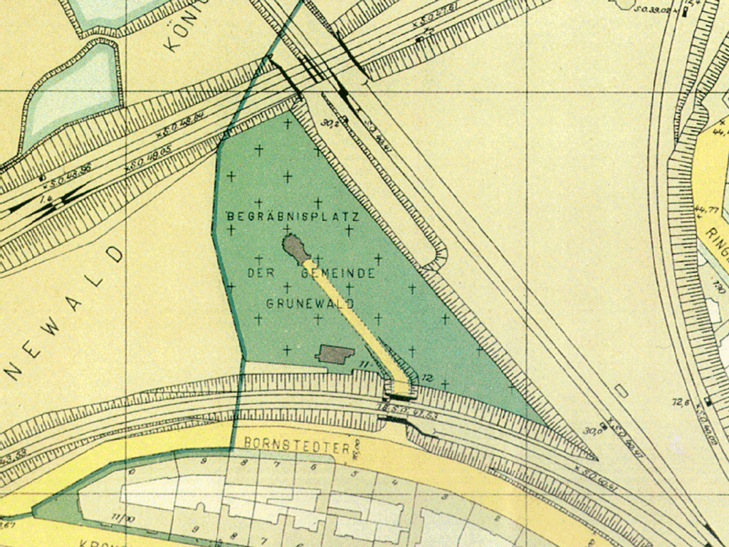 Friedhof Grunewald, Kartenausschnitt